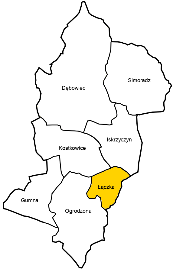 Sołectwo Łączka na mapie gminy